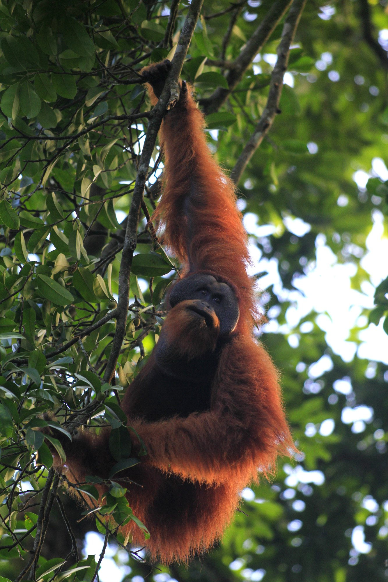 Sumatran orangutan (Pongo abelii) in Leuser National Park, Aceh Province, Indonesia.